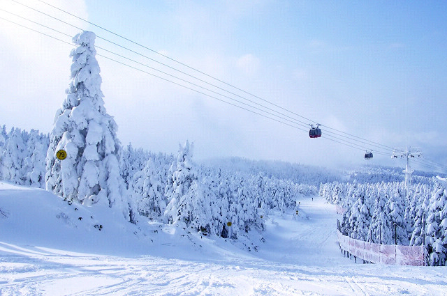 山形蔵王温泉スキー場 （山形県山形市） 樹氷原コース Zao Onsen Ski Area (Yamagata City, JAPAN)